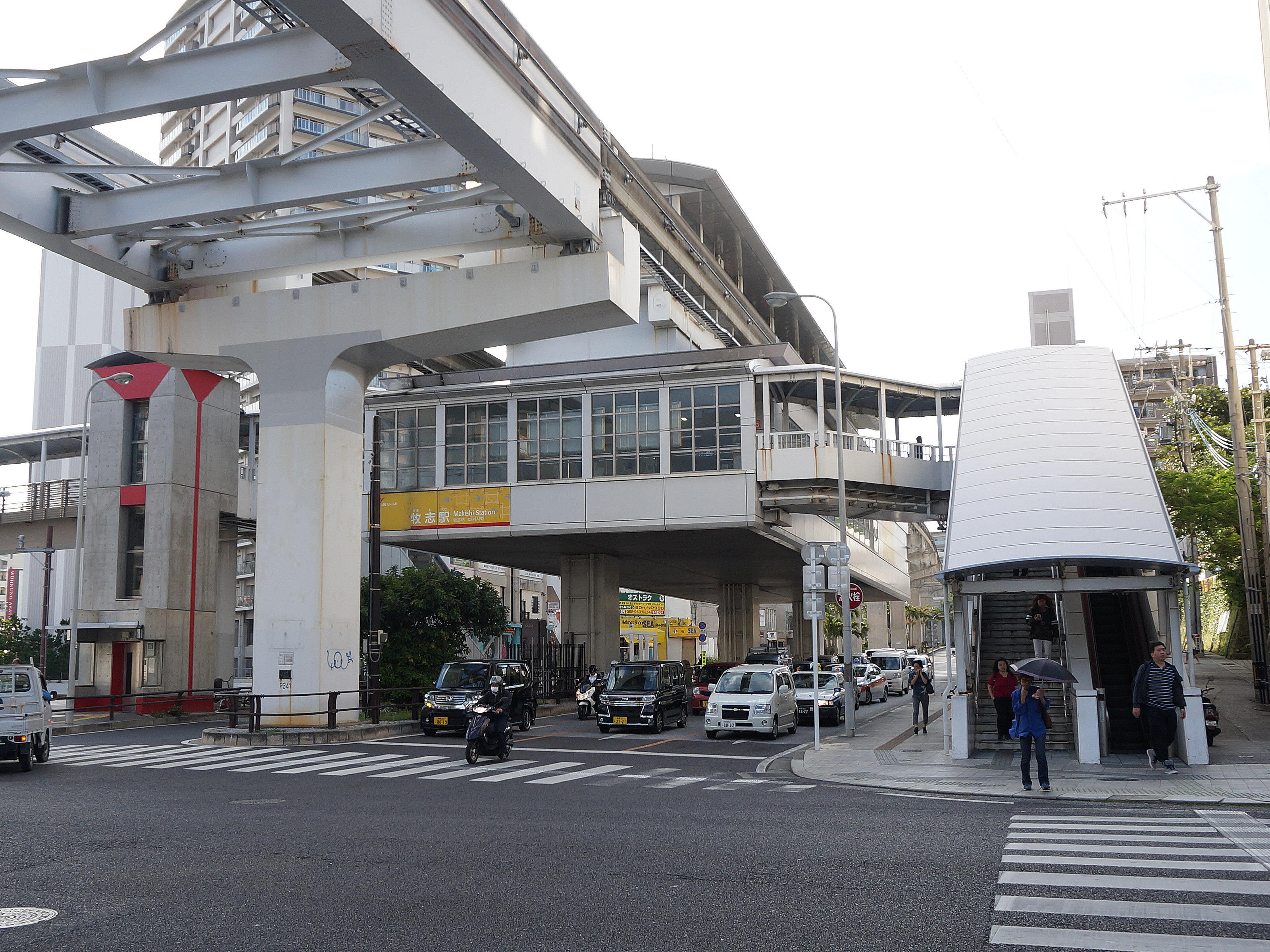 於沖繩縣那霸市國際通仰望沖繩都市單軌電車牧志站。